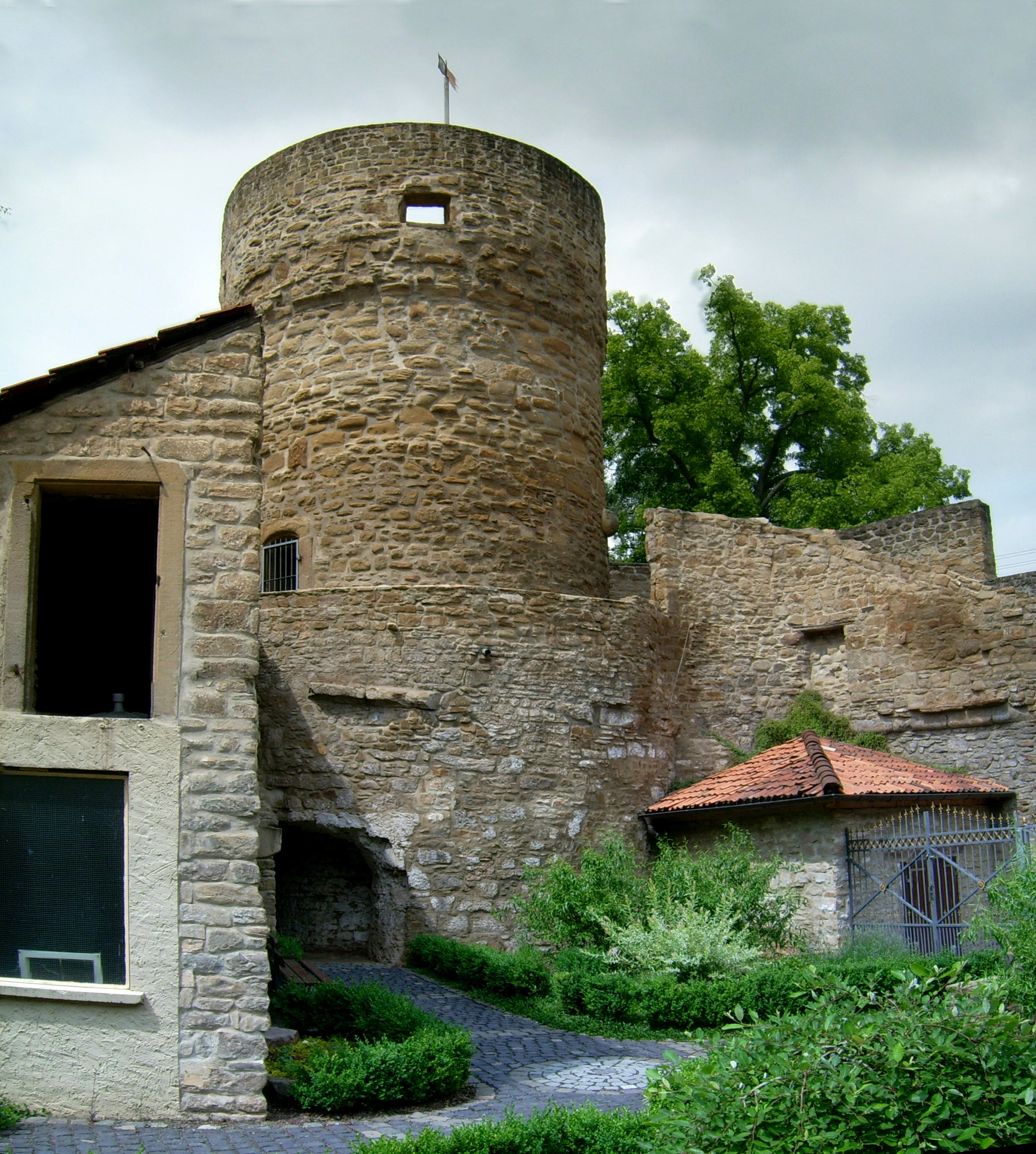 Burgruine in Meisenheim